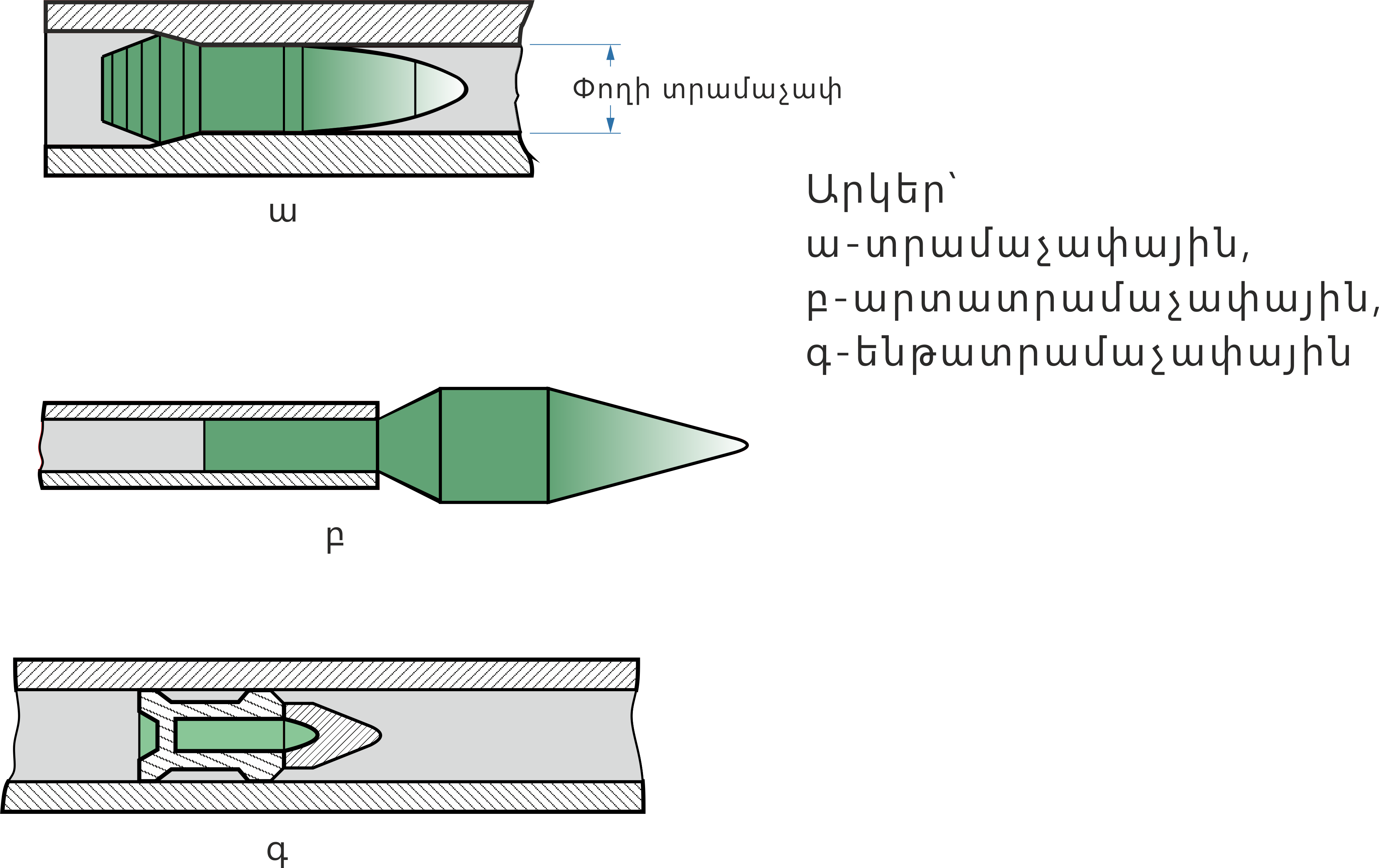 Հրետանային արկերի տեսակները